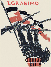 Propagandni plakat hrvatskih partizana